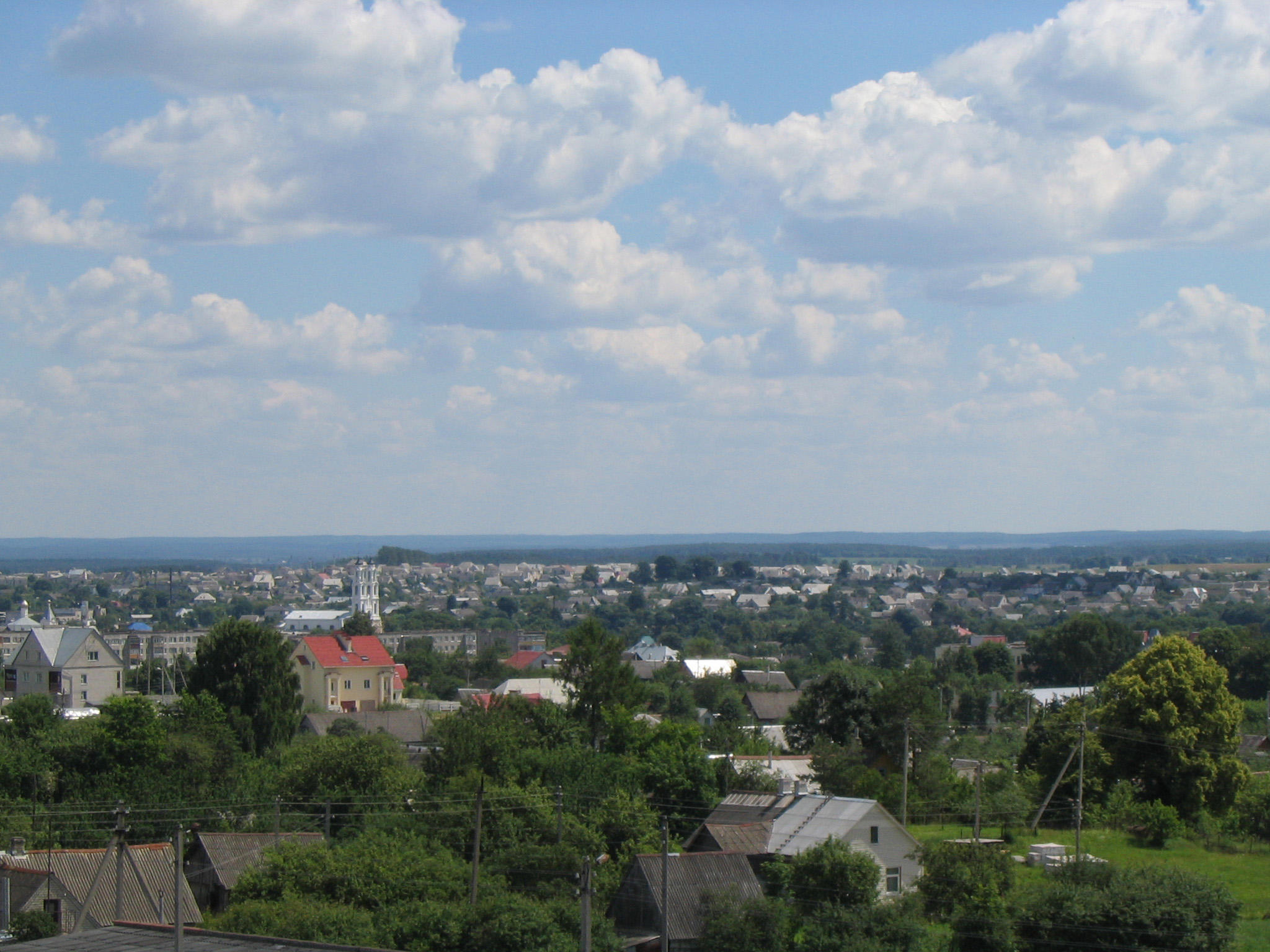 Panorama of Ašmiany, Belarus